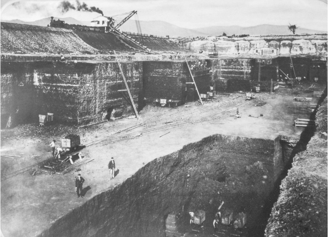 Grube Hedwig in Ervěnice (Seestadtl) bei Most in Tschechien.